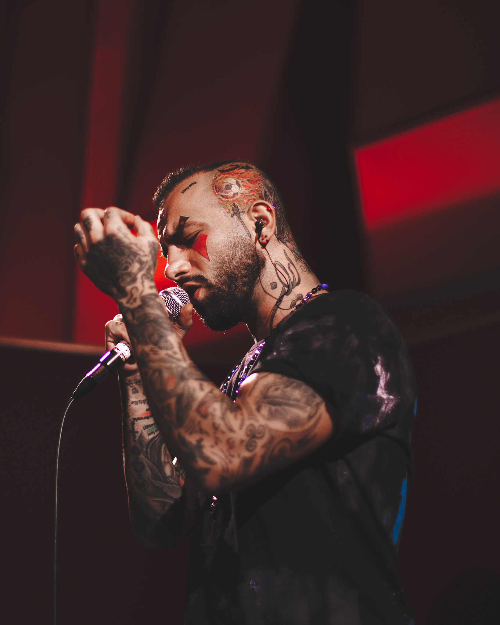 عکس توسط پوریا افخمی در شهر تفلیس ثبت شده است.